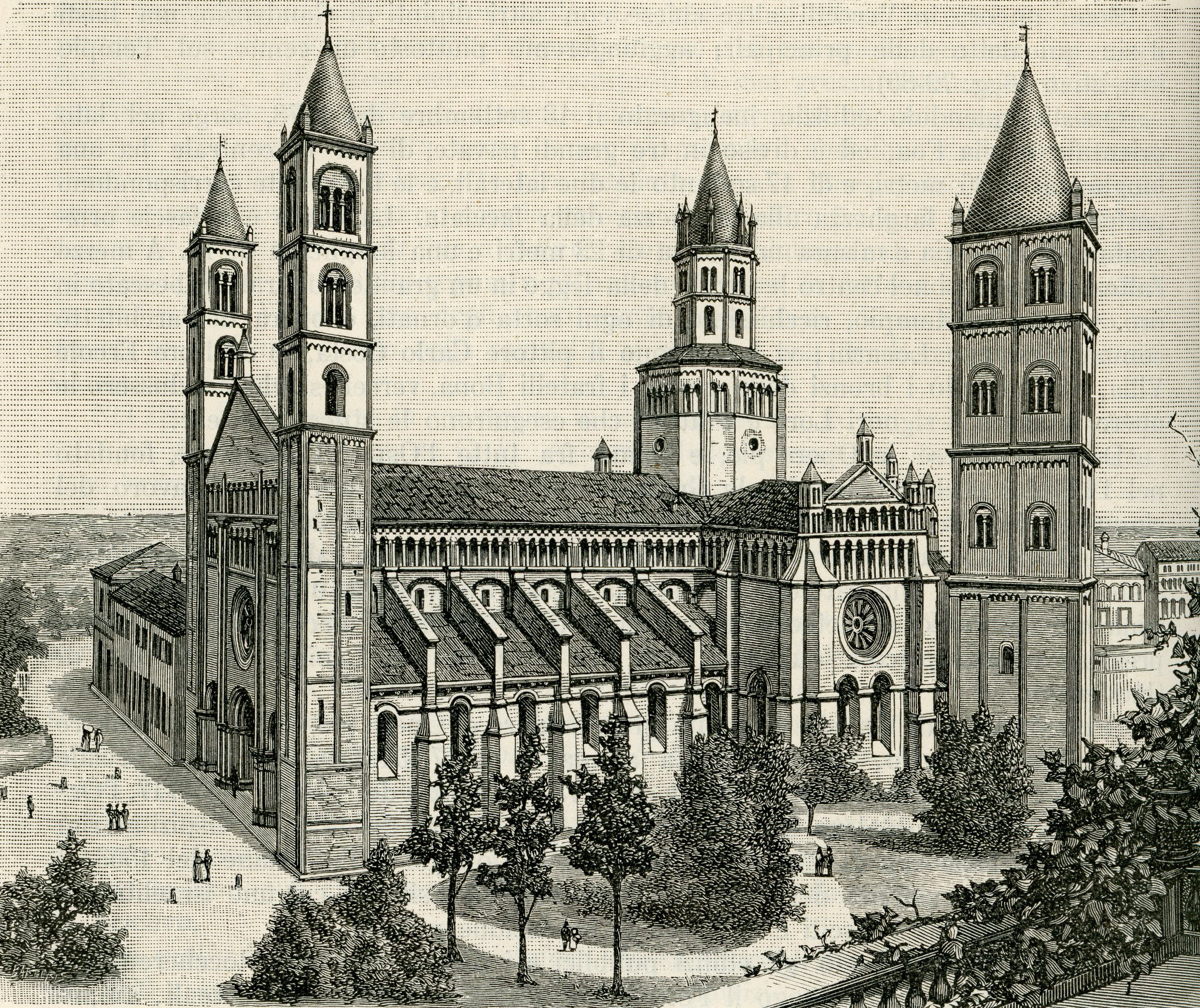 Basilica di Sant’Andrea in Vercelli, (xilografia di Barberis).